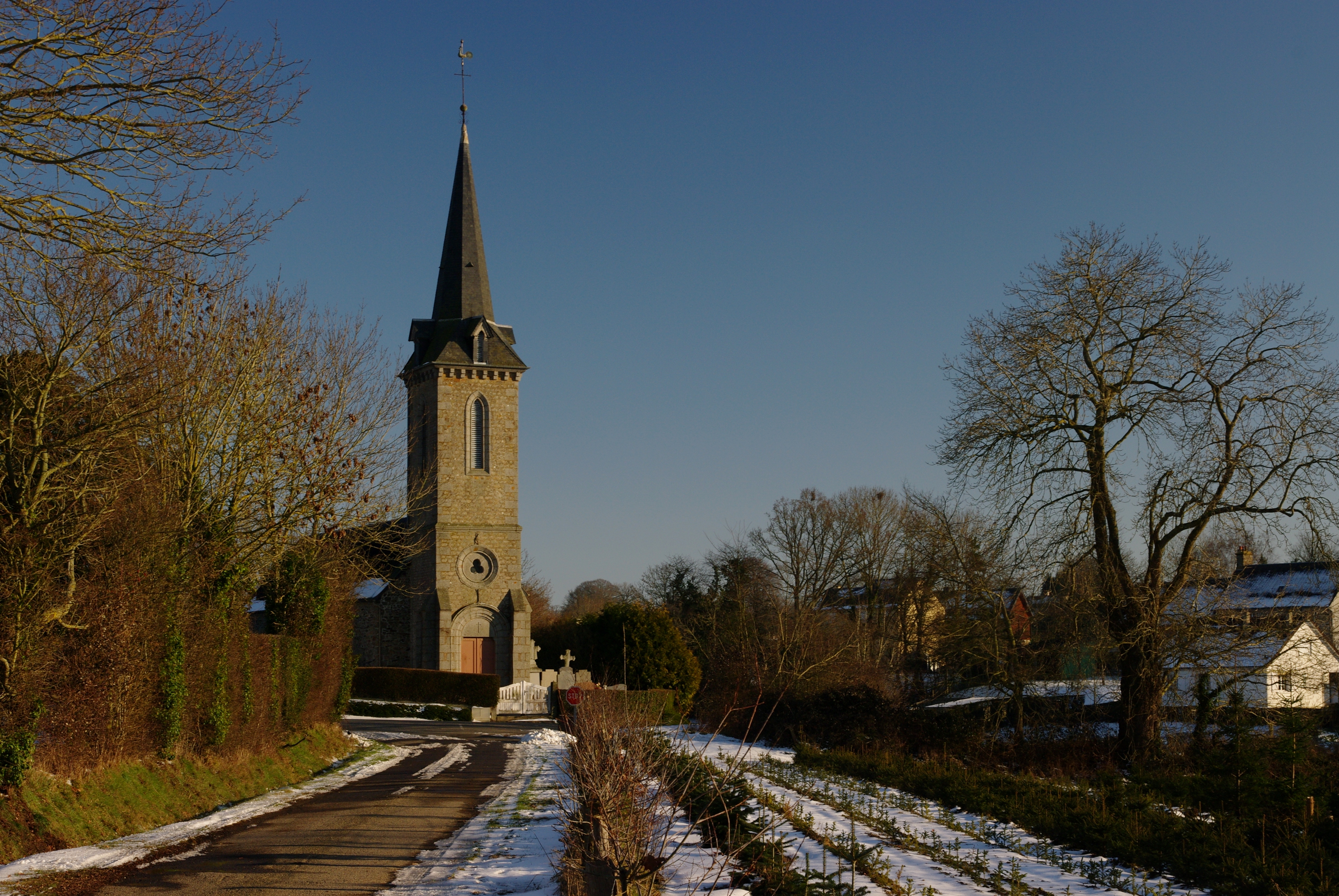 Une vue de l'église Saint-Christophe à La Bazoque, 61.